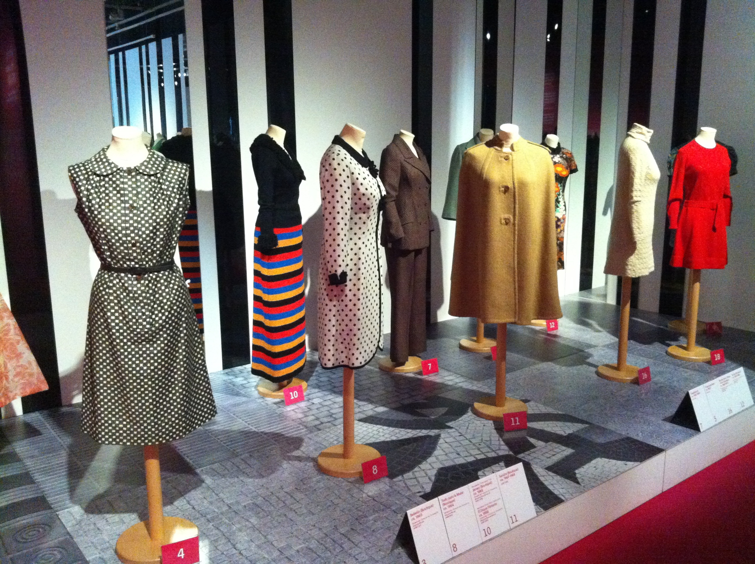 Barcelona pret-a-porter exhibition at Palau Robert